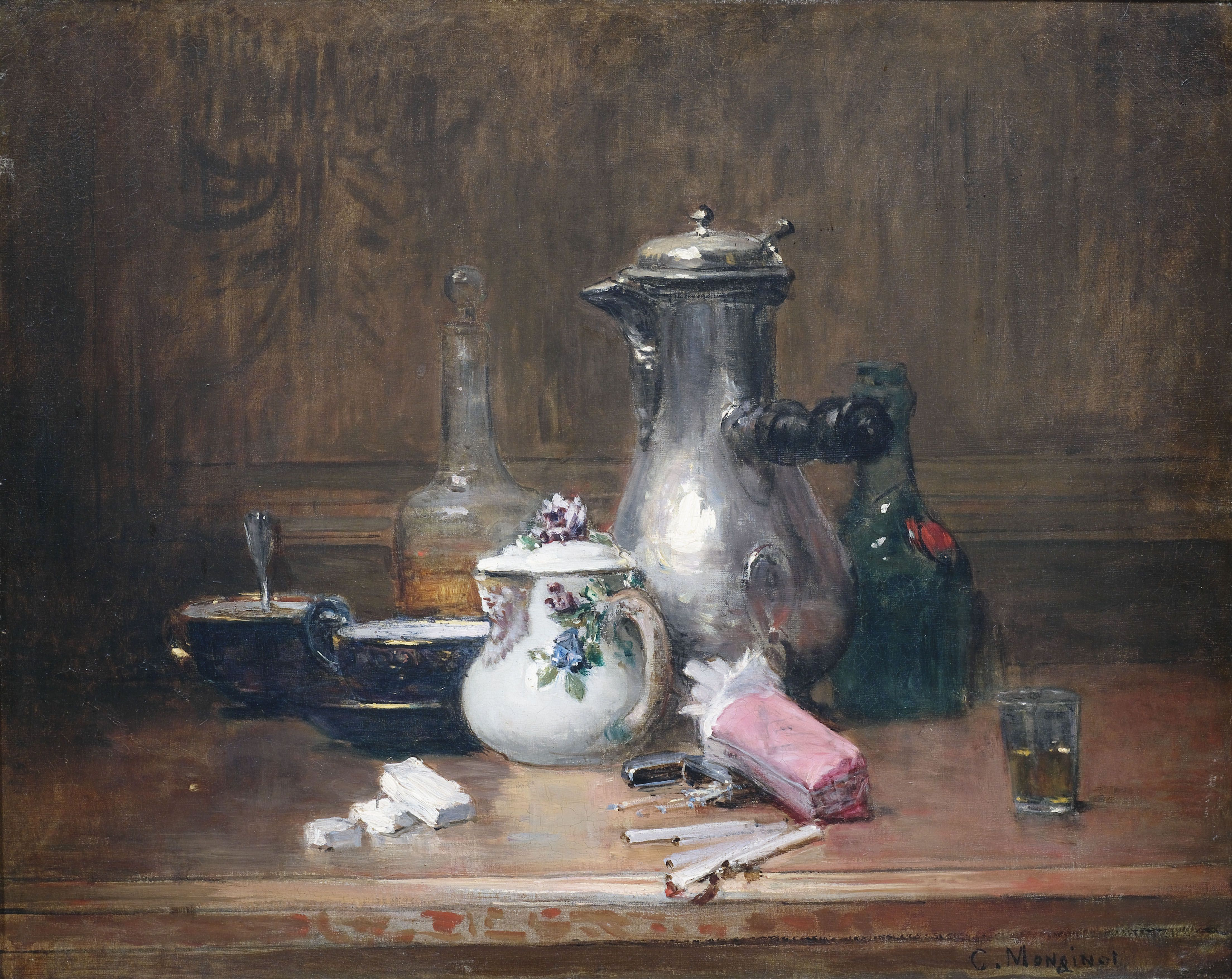 Nature morte du bon vivant. Stilleben mit Kaffeegeschirr, Cognacflasche und Zigaretten.